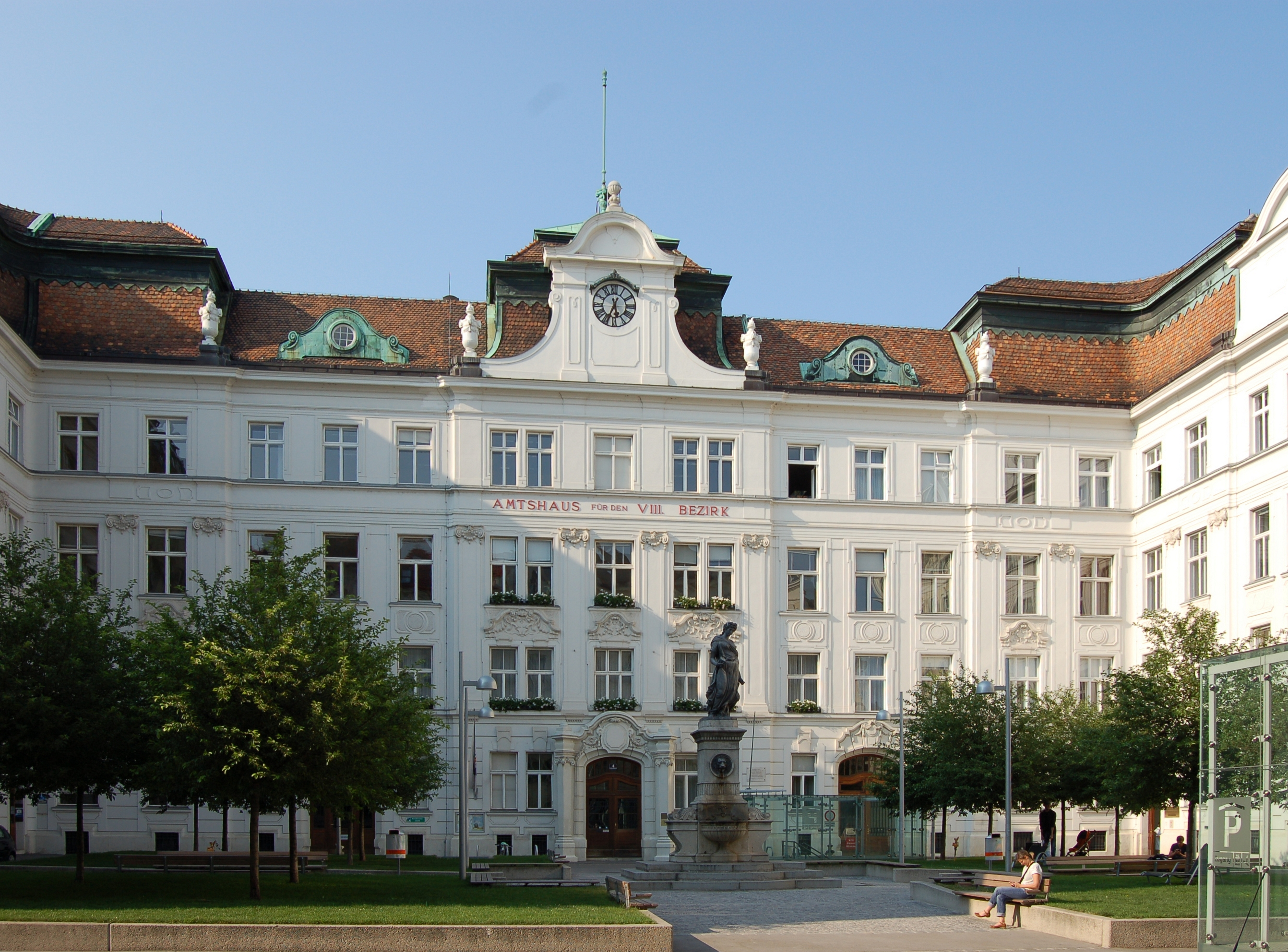 Das denkmalgeschützte Magistratische Bezirksamt für den 8. Bezirk in Wien-Josefstadt.